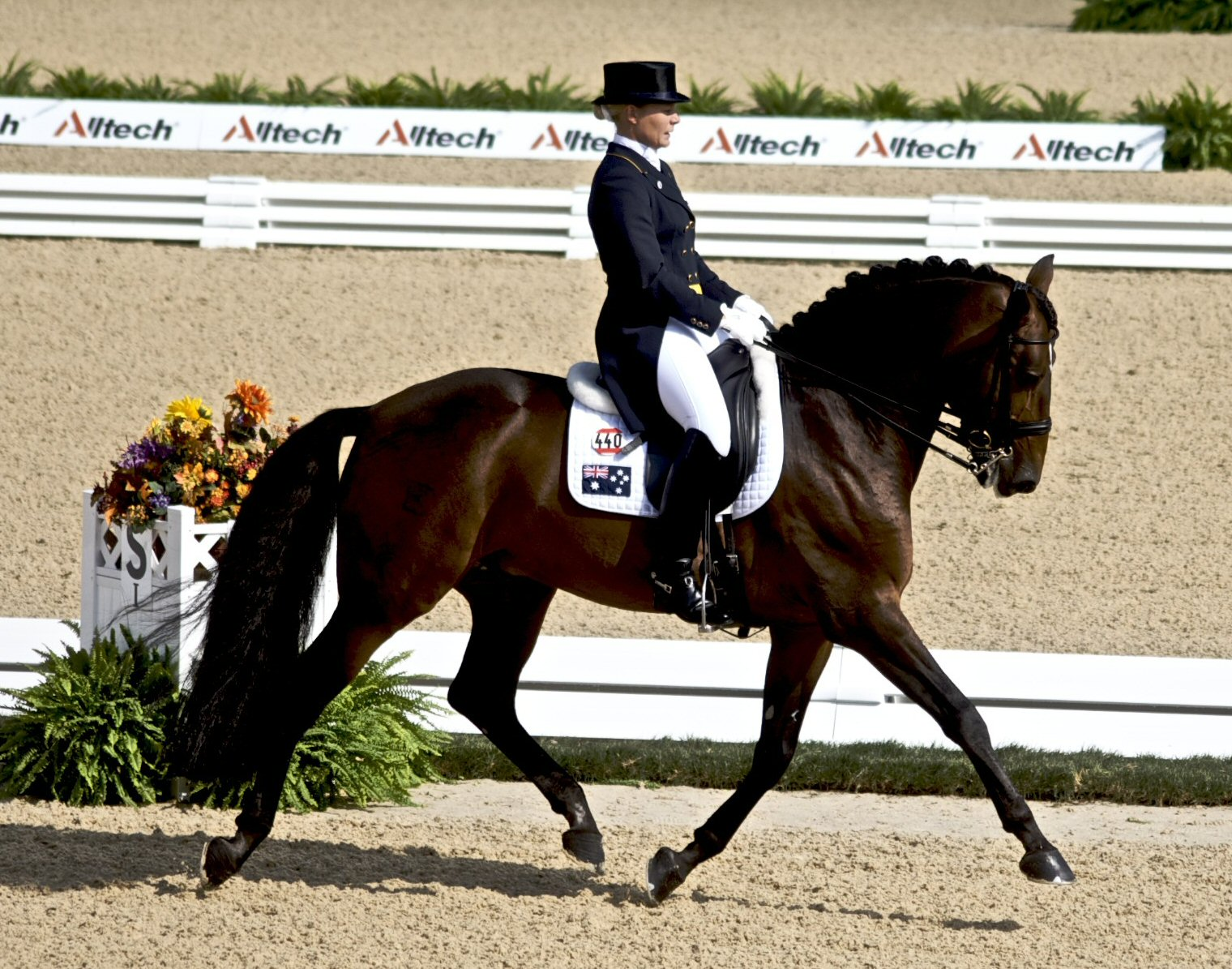 Hayley Beresford & Relampago do Retiro (Lusitano Stallion bred in Brazil) for Australia